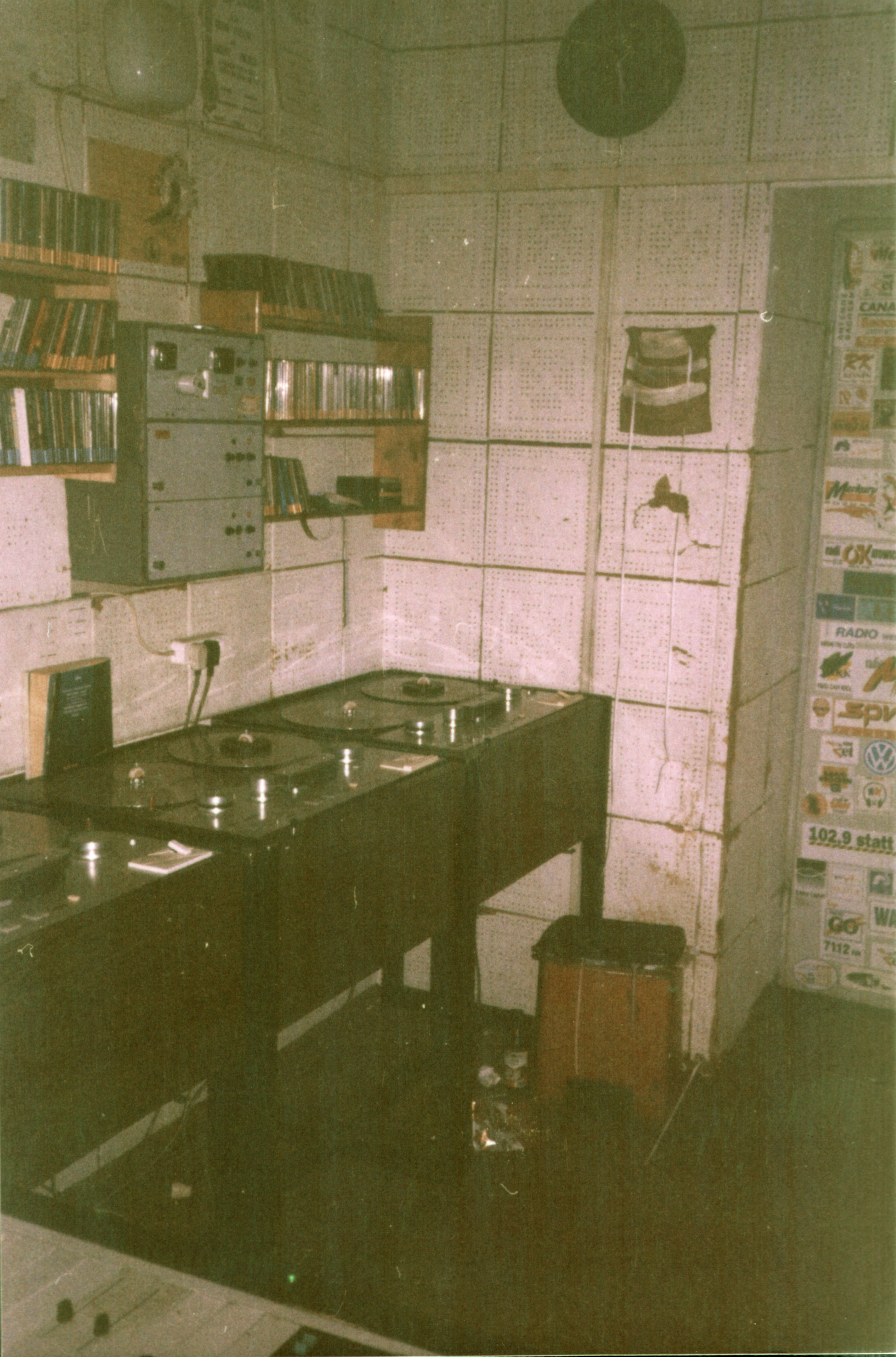 Realizatorka radia Afera Poznan. Widok na szpulowe magnetofony